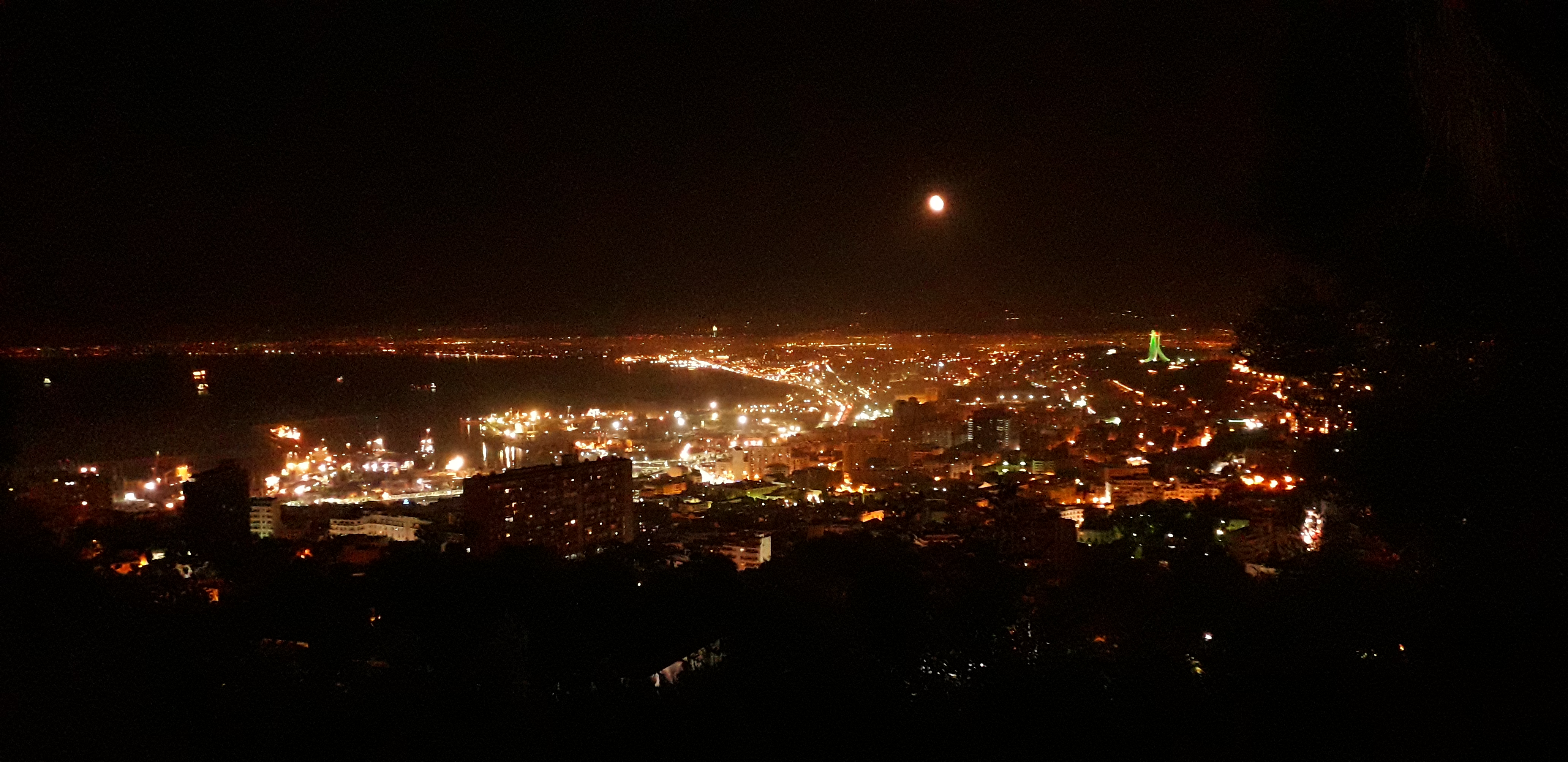 Nuit sur alger